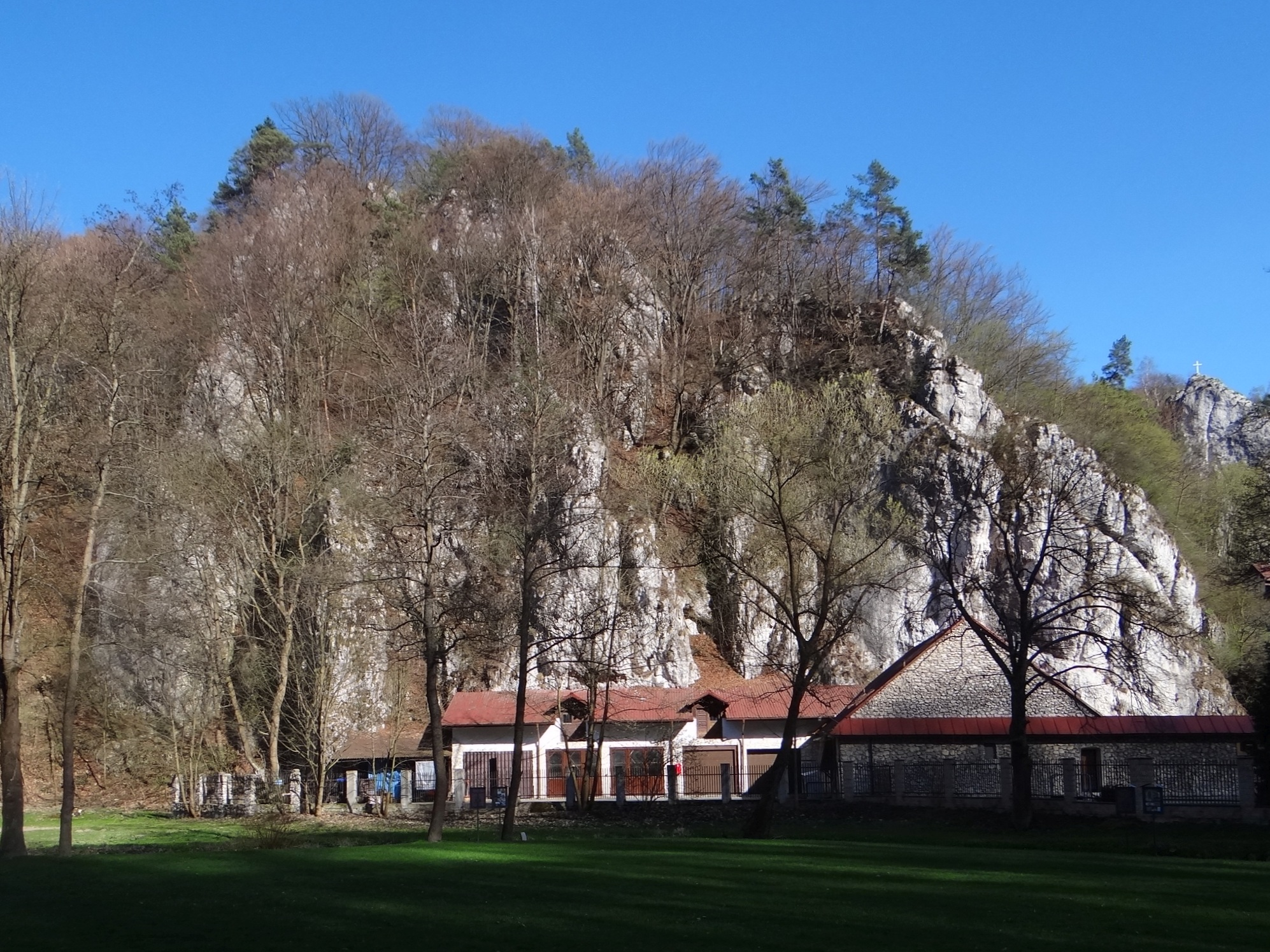 Skała kopcowa i Dom Pomocy społecznej bravi Albertynów w Dolinie Prądnika w Ojcowskim Parku Narodowym